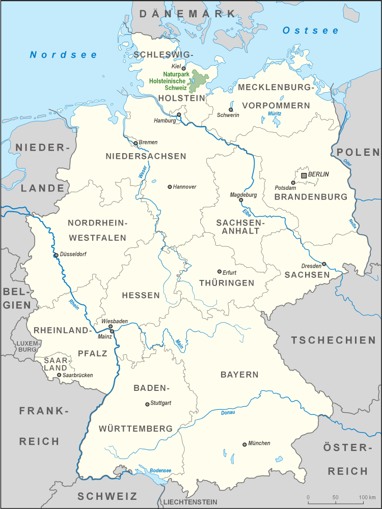 Karte des Naturparks Holsteinische Schweiz in Deutschland